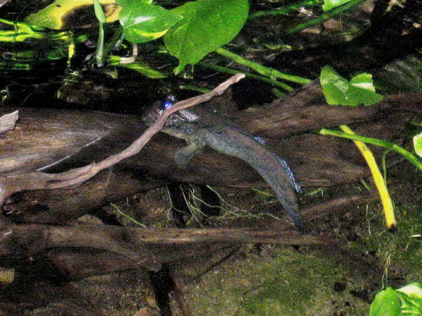 lezec obojživelnýLatina: Periophthalmus barbarus